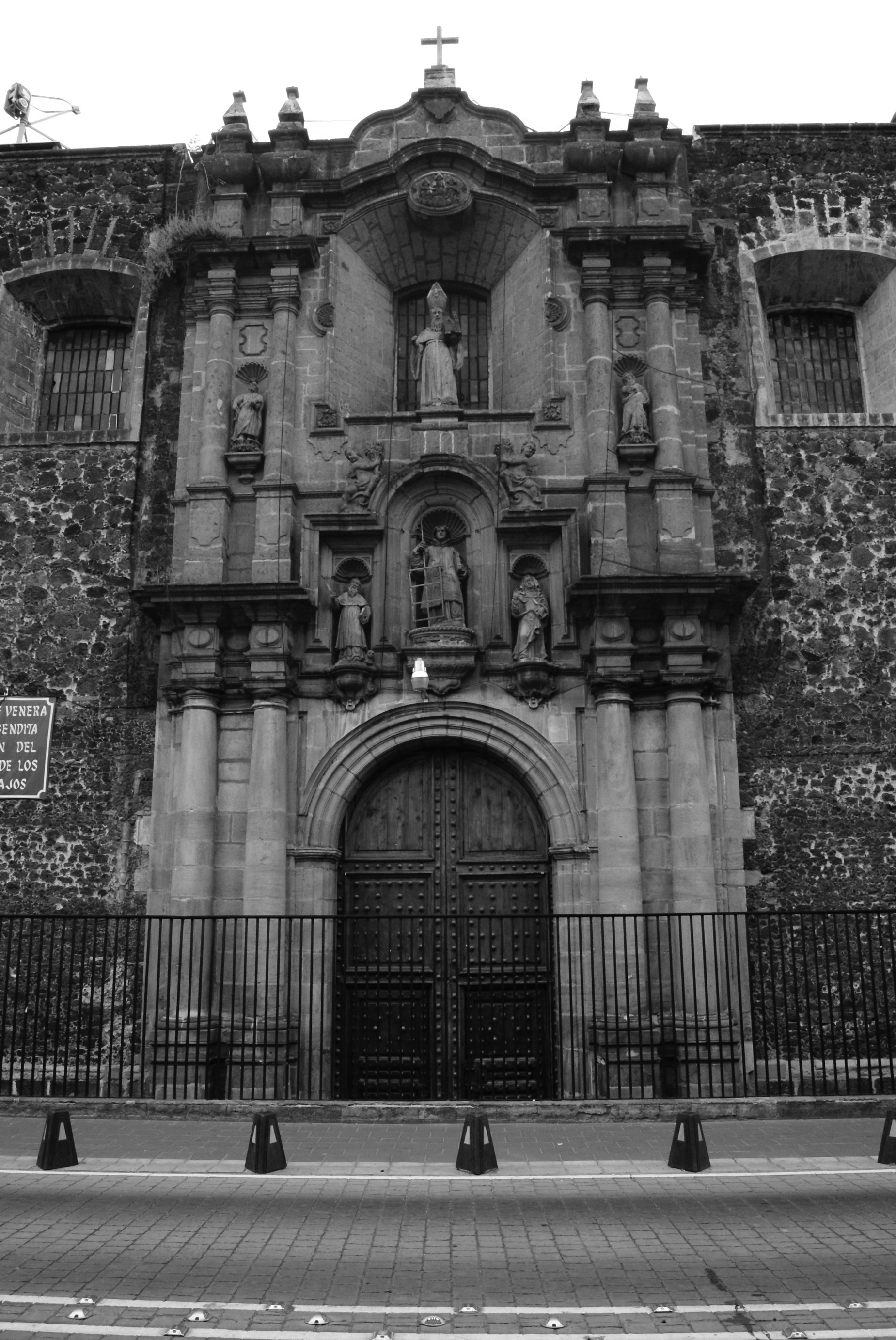 Belisario Domínguez # 28 Col. Centro